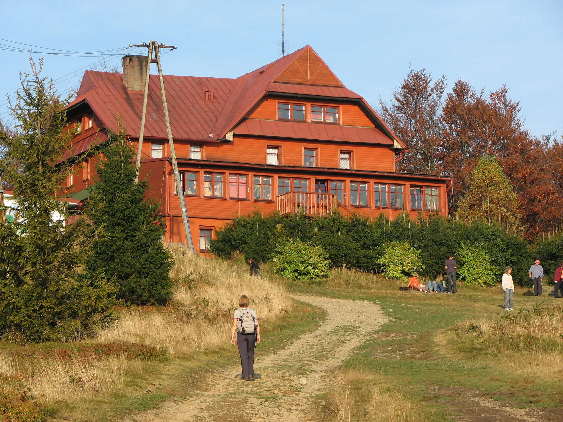 Schronisko na Błatniej (Beskid śląski)